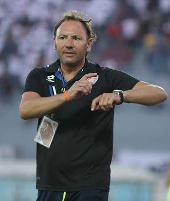 Stefano Cusin, durante il match finale della Coppa West Bank in Palestina, nelle file dell'Ahli Al Khalil.